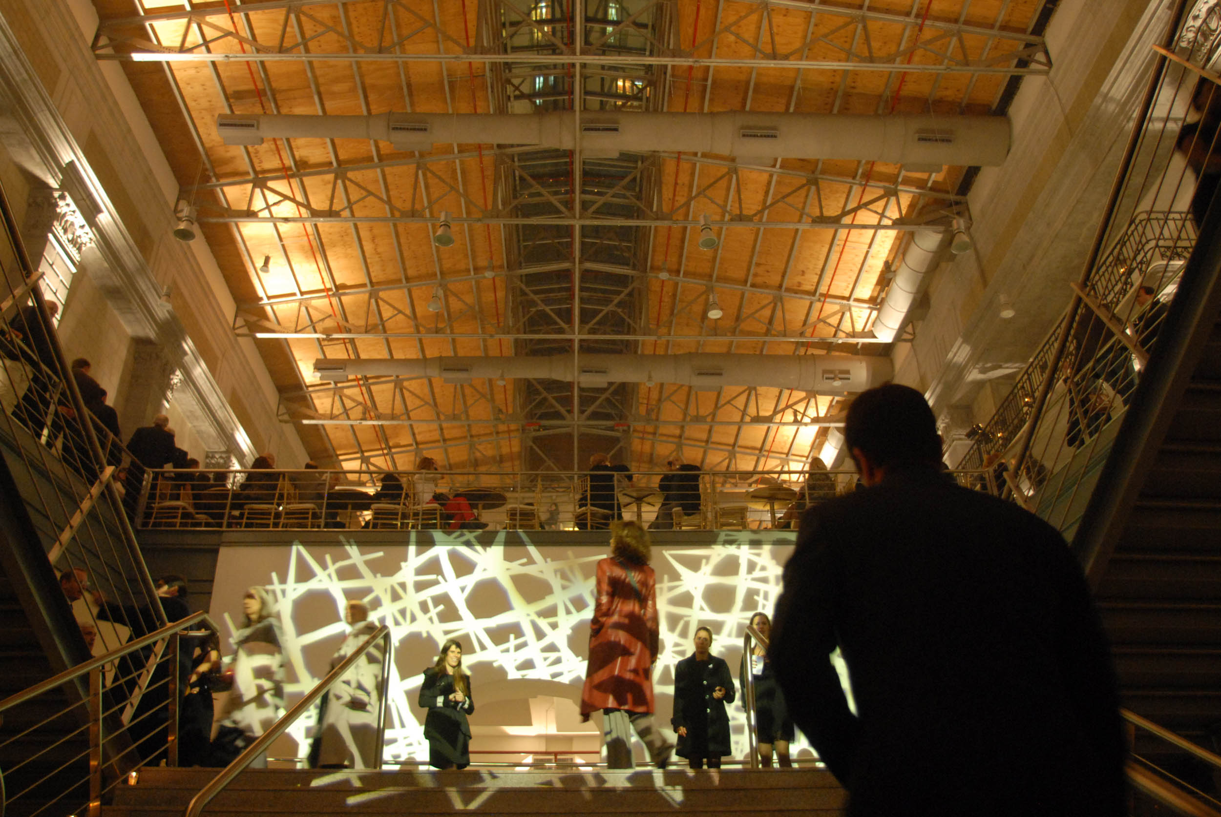 Buenos Aires, 23 de Mayo de 2012. El jefe de Gobierno Mauricio Macri inagura la Usina de las Artes, un espacio cultural ubicado en pleno corazón de La Boca.